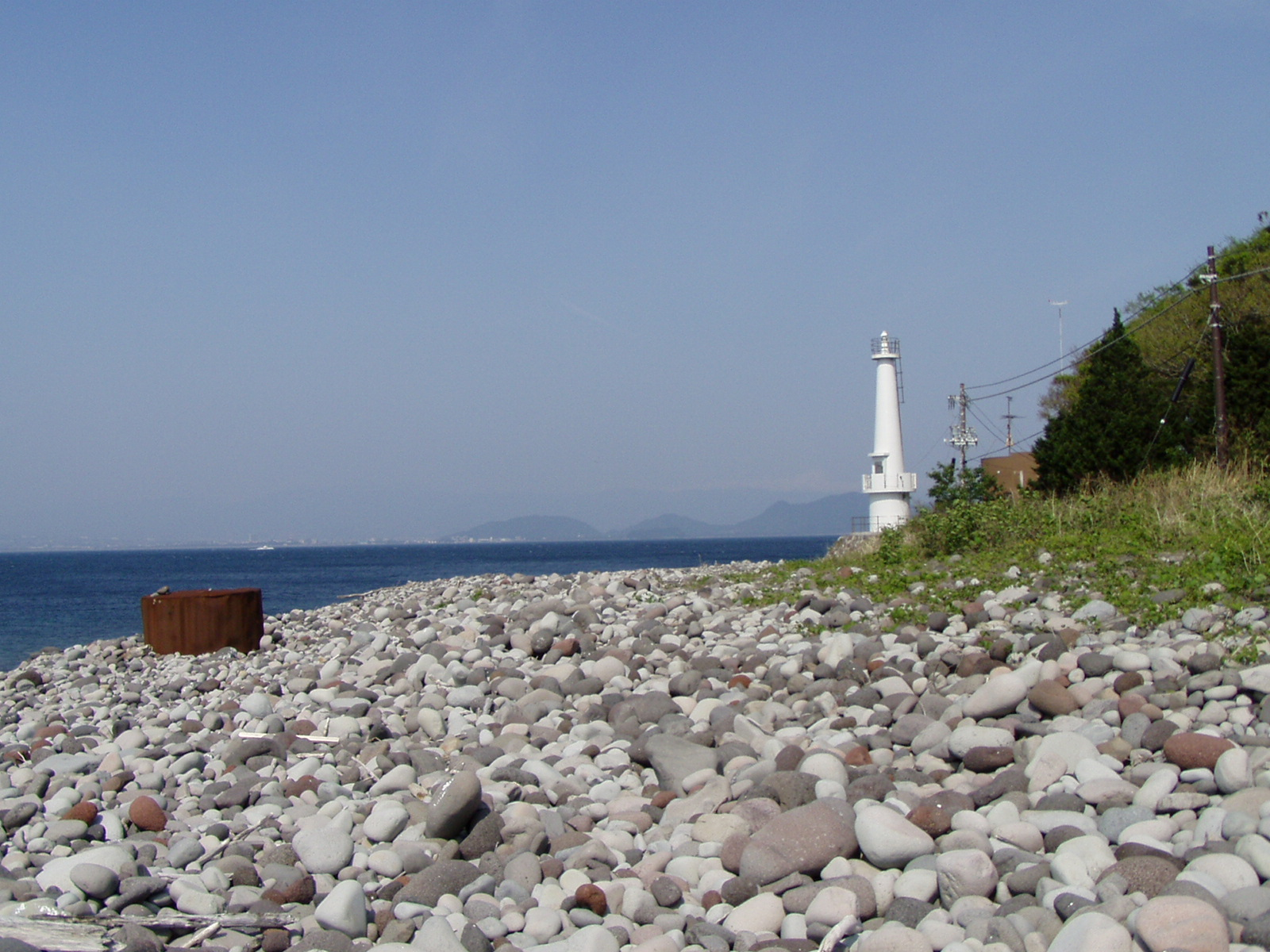 Osezaki beacon in Numazu Shizuoka Japan. 駿河湾に面した大瀬崎灯台。遠景に見えるのは沼津市の市街地。